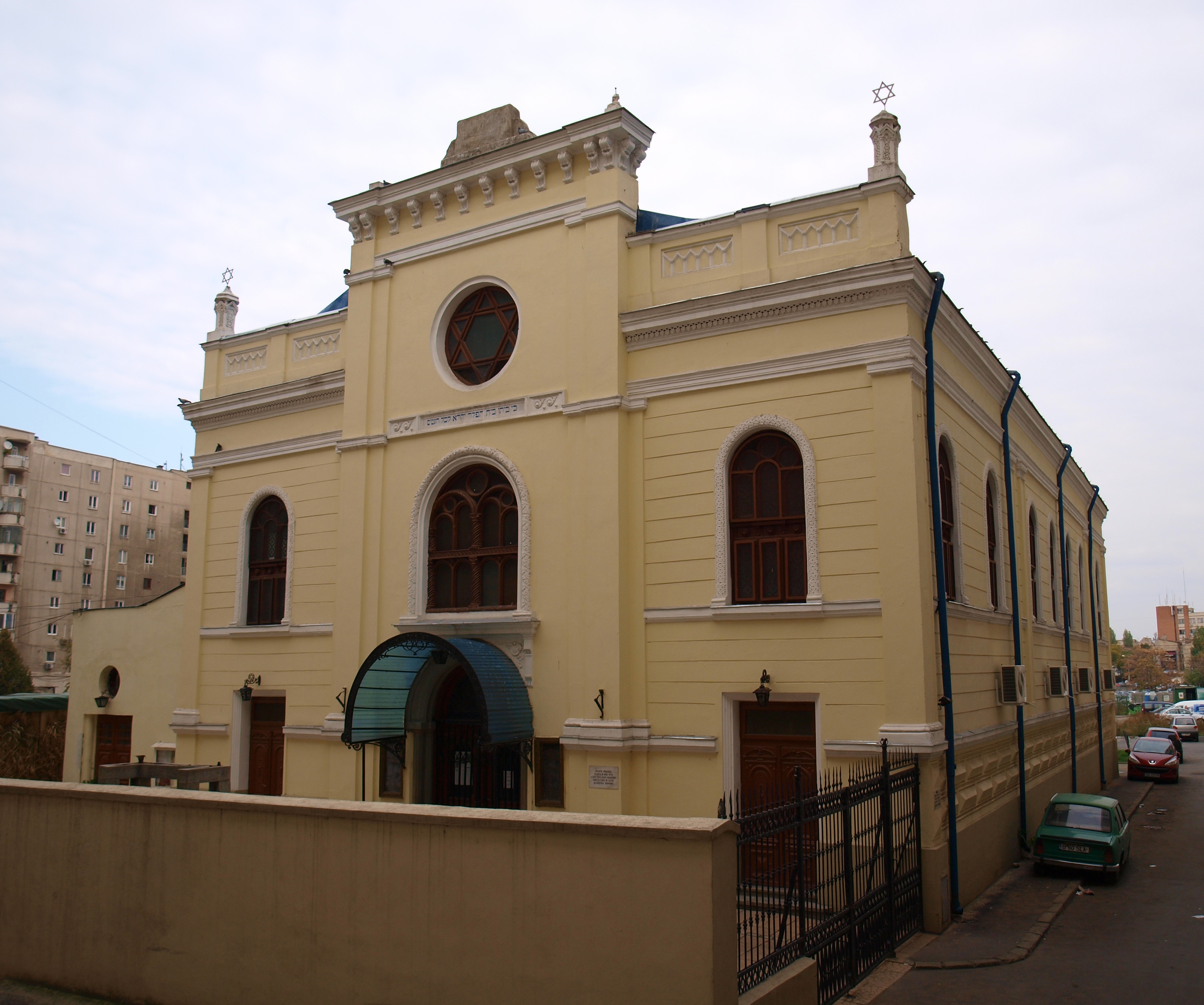 בית הכנסת הגדול, בוקרשטRomână: Sinagoga Mare, Bucureşti